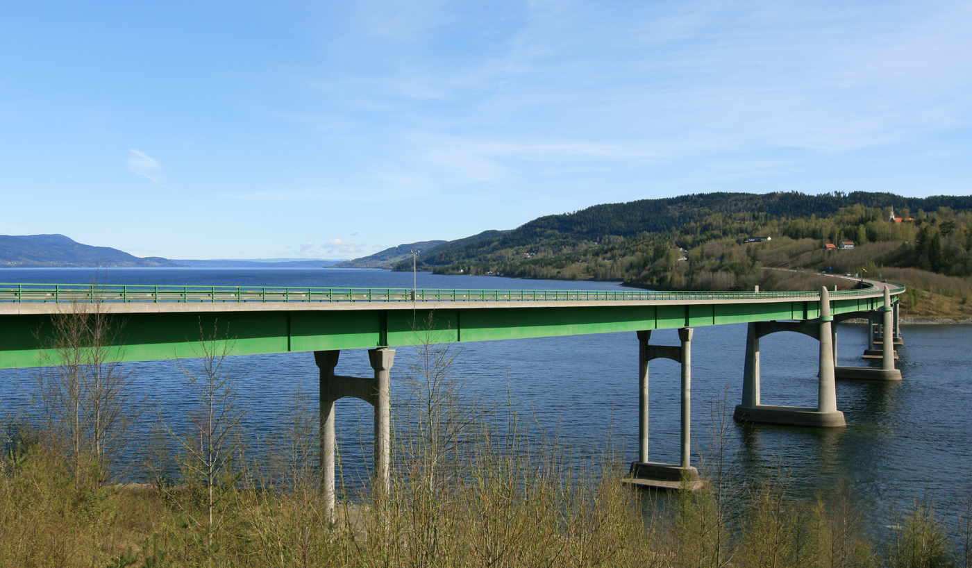 Nye Minnesundbrua (E6), Eidsvoll